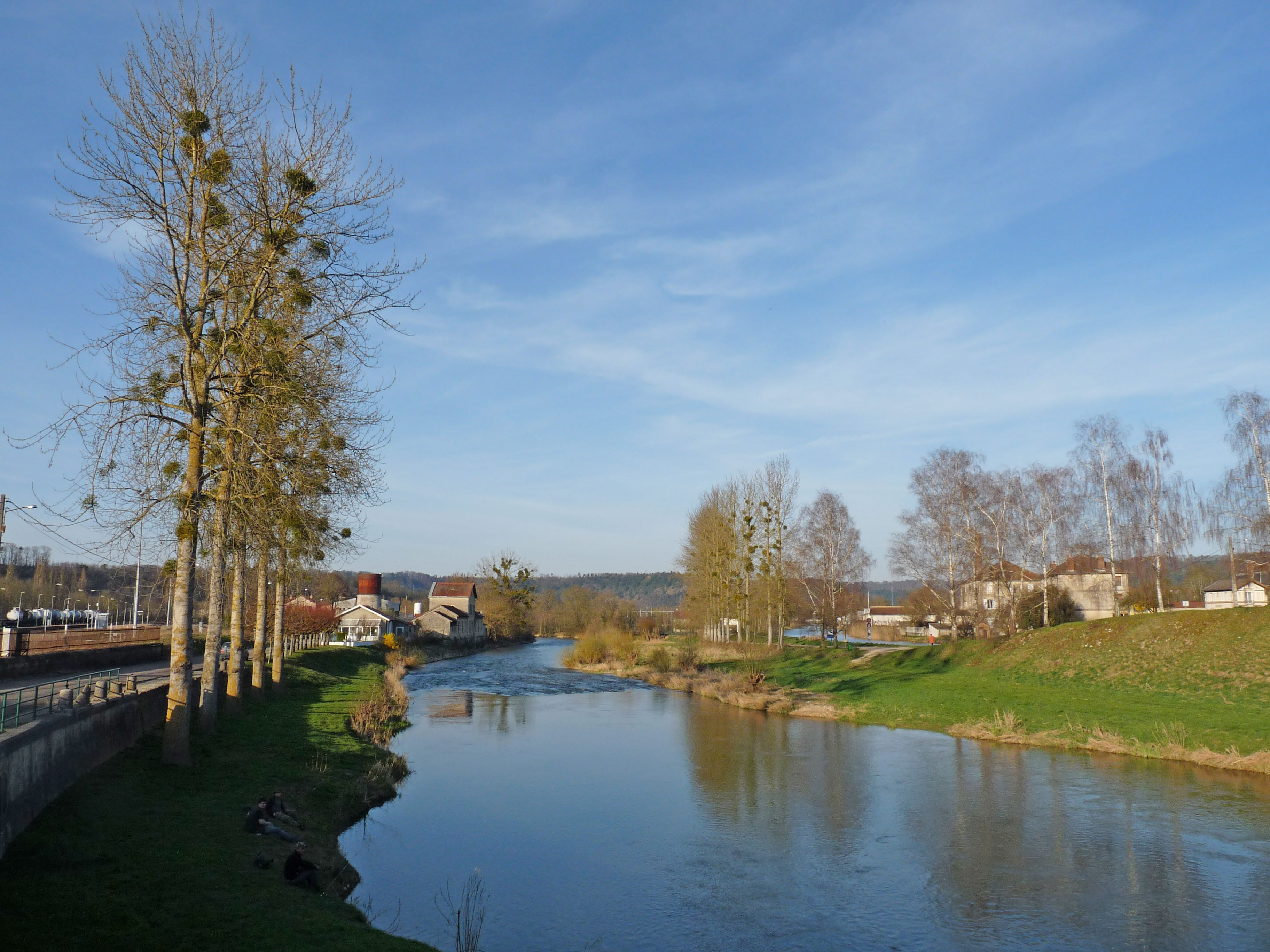 La Marne à Joinville (Haute-Marne). A l'arrière-plan, à droite, on aperçoit le Canal de la Marne à la Saône.